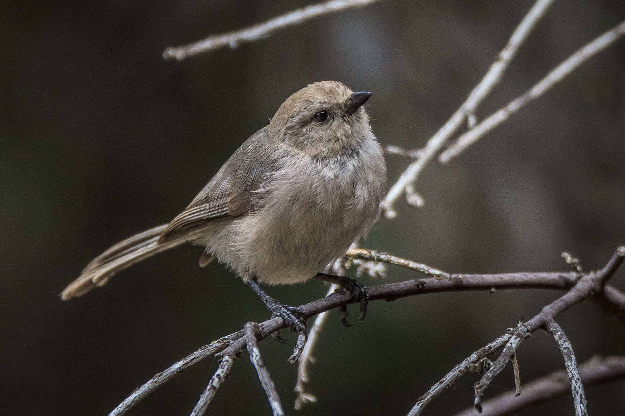 El Sobrante, California